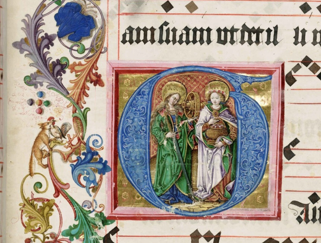 Graduál loucký (1499), strana 272, Iniciála Gaudeamus, svatá Kateřina a svatá Dorota, v dekoru liška s kohoutem v tlamě. Vědecká knihovna v Olomouci, signatura M IV 1